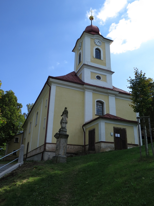 Kostel Nejsvětější Trojice, Velká Úpa.